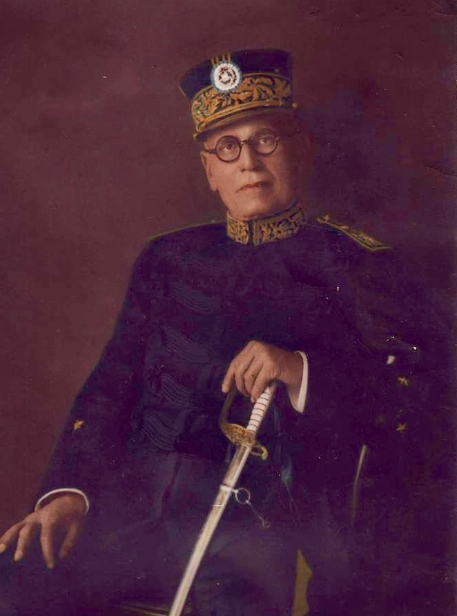 Presidente de Guatemala Manuel María Orellana Contreras.